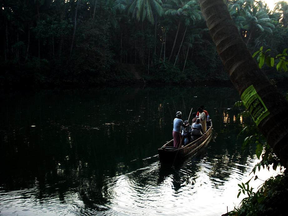 River Odakkadav അഞ്ചരക്കണ്ടി പുഴ ഓടക്കടവിൽ എത്തിയപ്പോൾ തോണിയിൽ കടവ് കടക്കുന്ന യാത്രക്കാർ